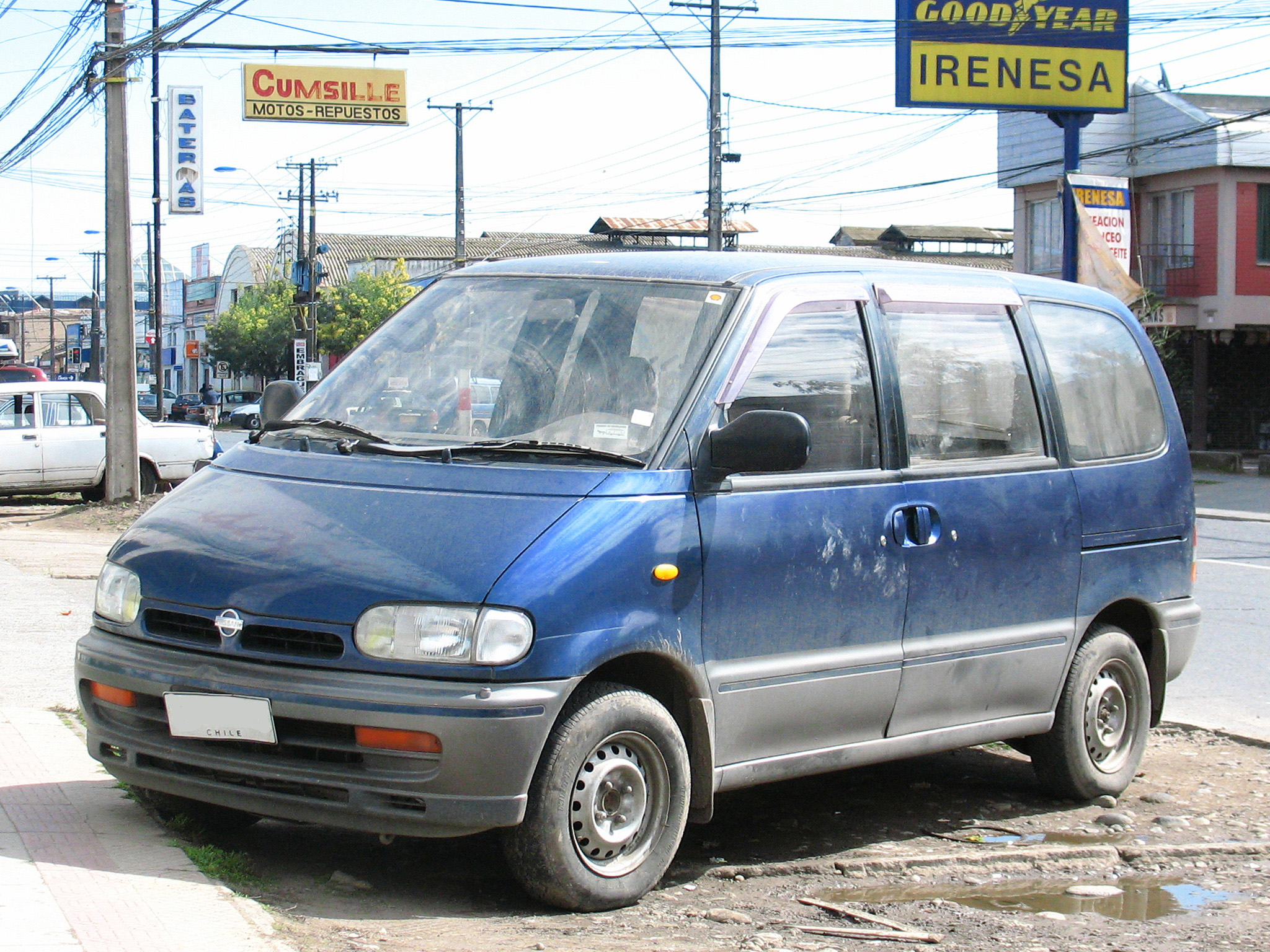 Nissan Vanette Serena FX 2.0 DT 1991